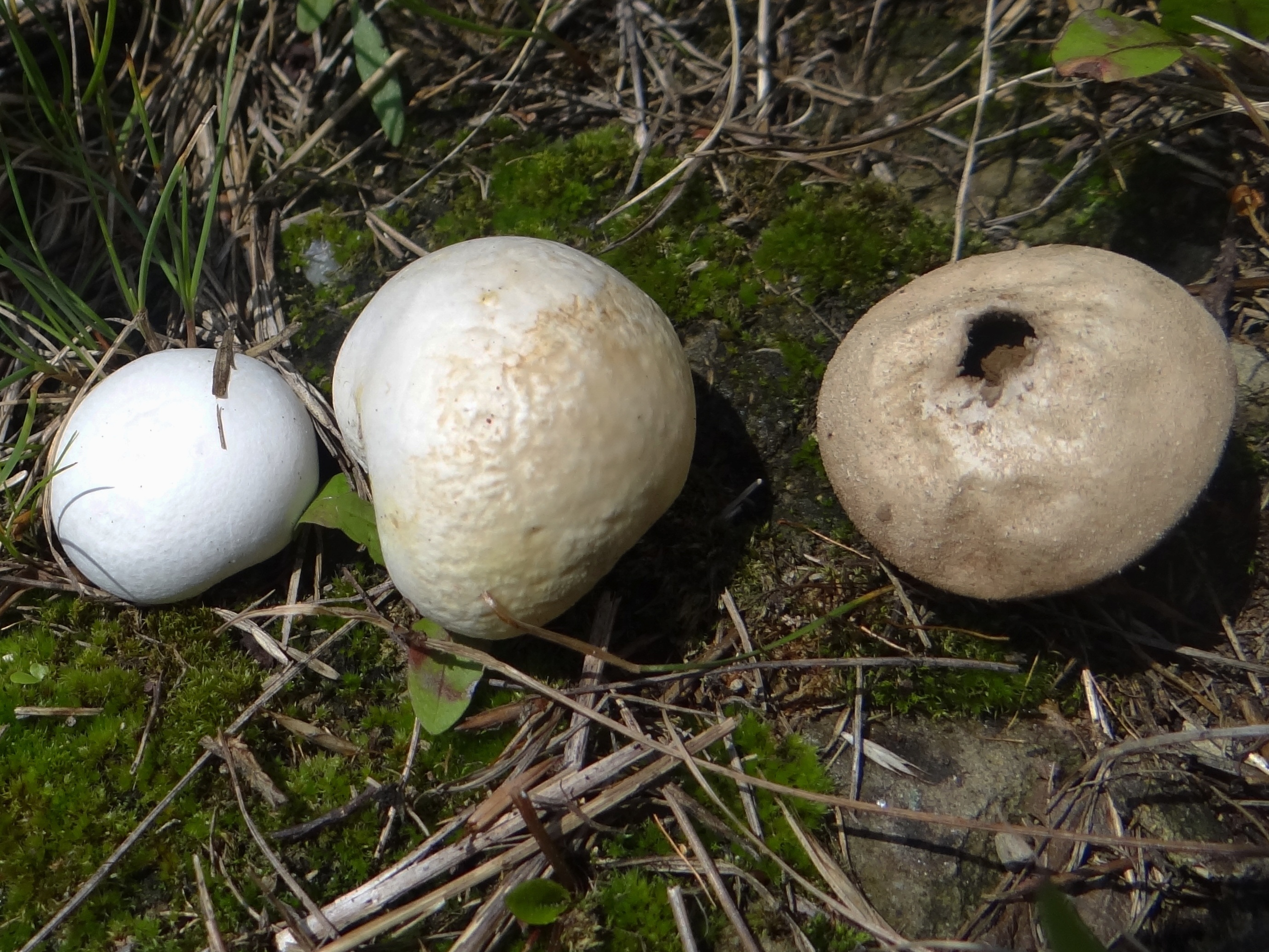 Bovista nigrescens (habitat:Beskid Sądecki, Jaworzyna Krynicka)